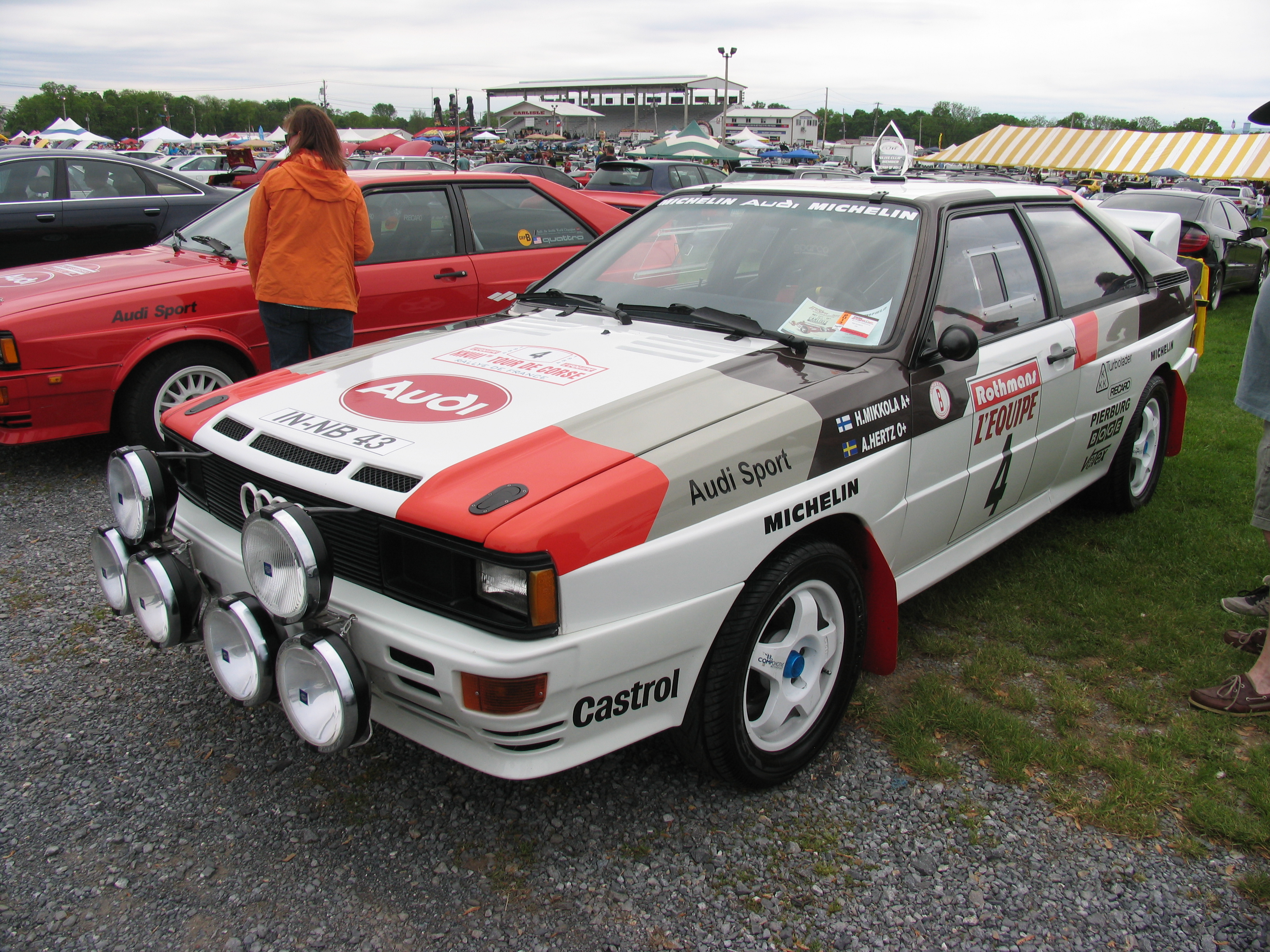 Audi Quattro Rally Car